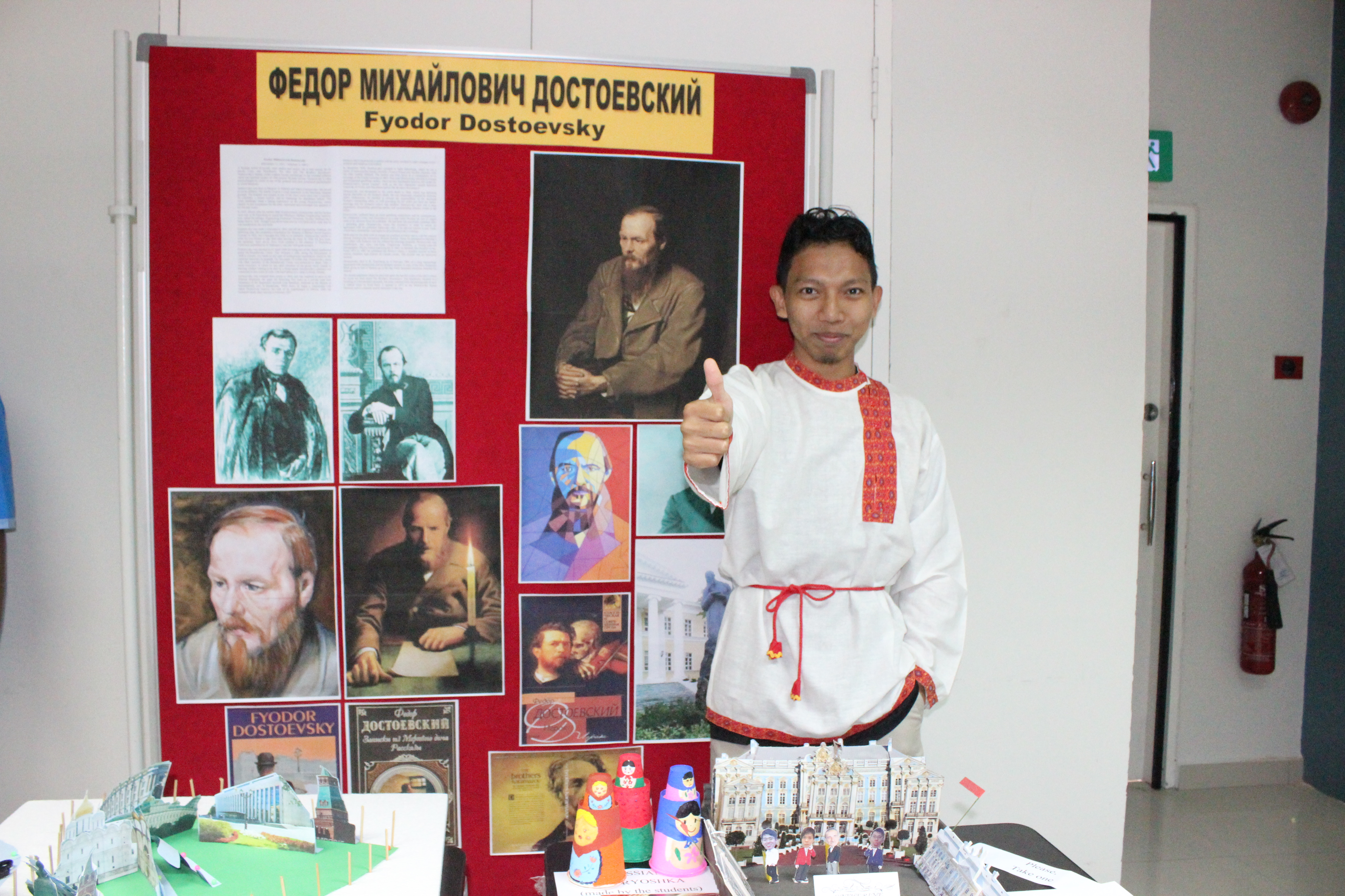 Дни Достоевского в Университете Малайя (октябрь 2011)